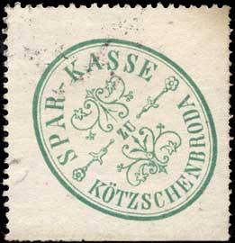 Sealing stamp Title: Spar-Kasse Kötzschenbroda Description: Sparkasse, grün, weiß Place: Kötzschenbroda size: 4x4 cm